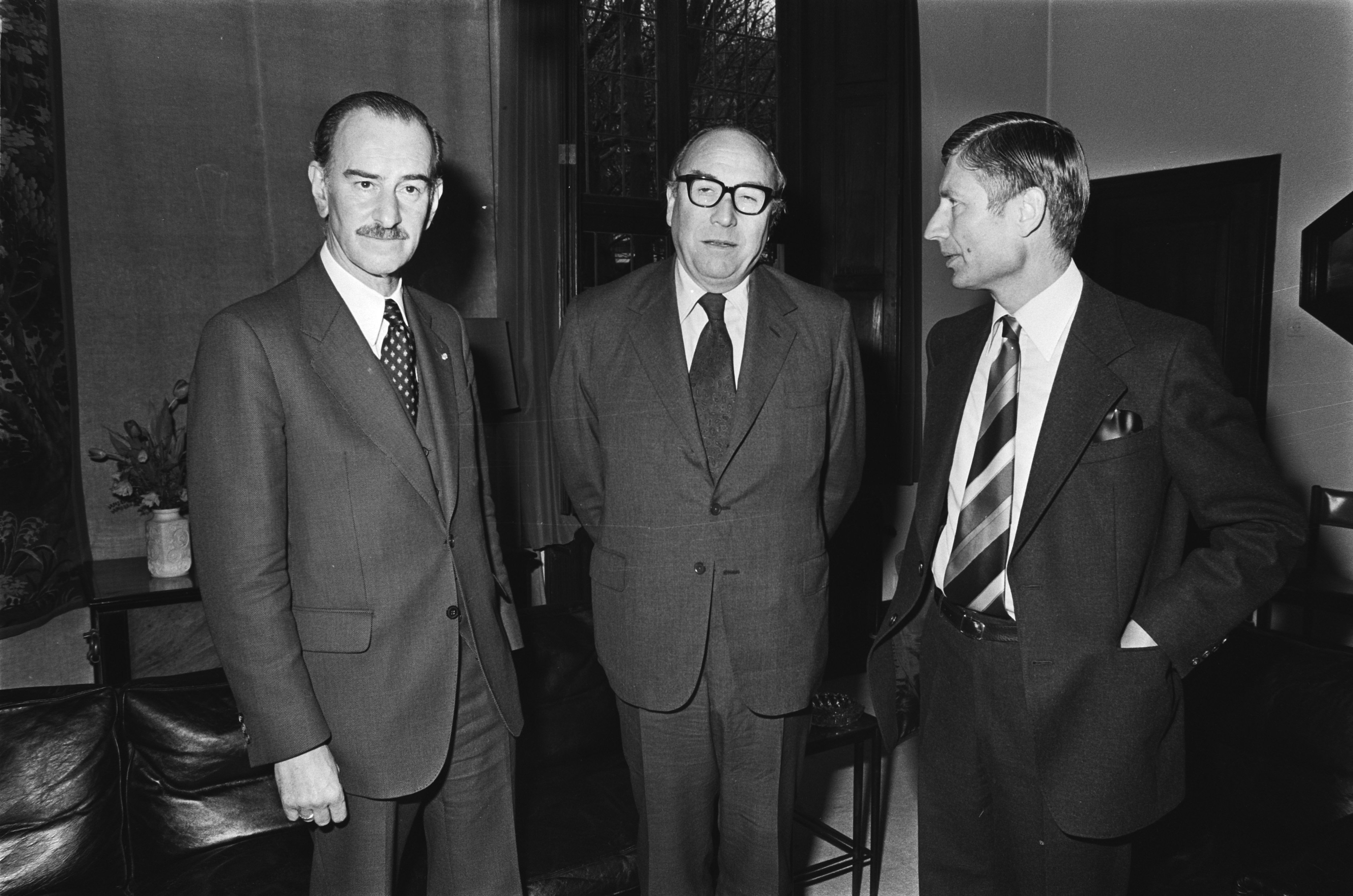 Collectie / Archief : Fotocollectie Anefo Reportage / Serie : [ onbekend ] Beschrijving : Roy Jenkins (voorzitter Europese Commissie ) bezoekt premier Van Agt (r), links minister Van de Klaauw (BZ) Datum : 21 maart 1978 Trefwoorden : commissies, premiers, voorzitters Persoonsnaam : Agt, Dries van, Klaauw, Chris van der Fotograaf : Peters, Hans / Anefo Auteursrechthebbende : Nationaal Archief Materiaalsoort : Negatief (zwart/wit) Nummer archiefinventaris : bekijk toegang 2.24.01.05 Bestanddeelnummer : 929-6338